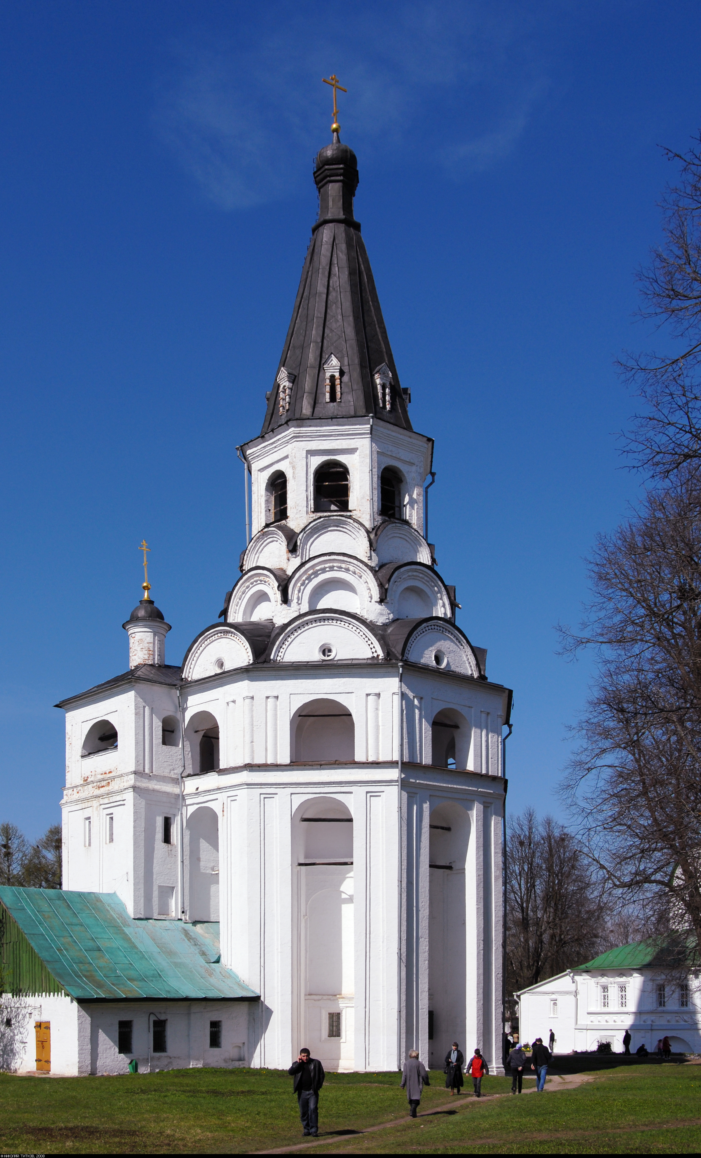 26/04/2008 Церковь Распятия Христова. Комплекс Александровского Кремля (Xvi—Xix вв.). Кремль был резиденцией Ивана Грозного. Ныне — музей-заповедник и действующий Свято-Успенский епархиальный женский монастырь